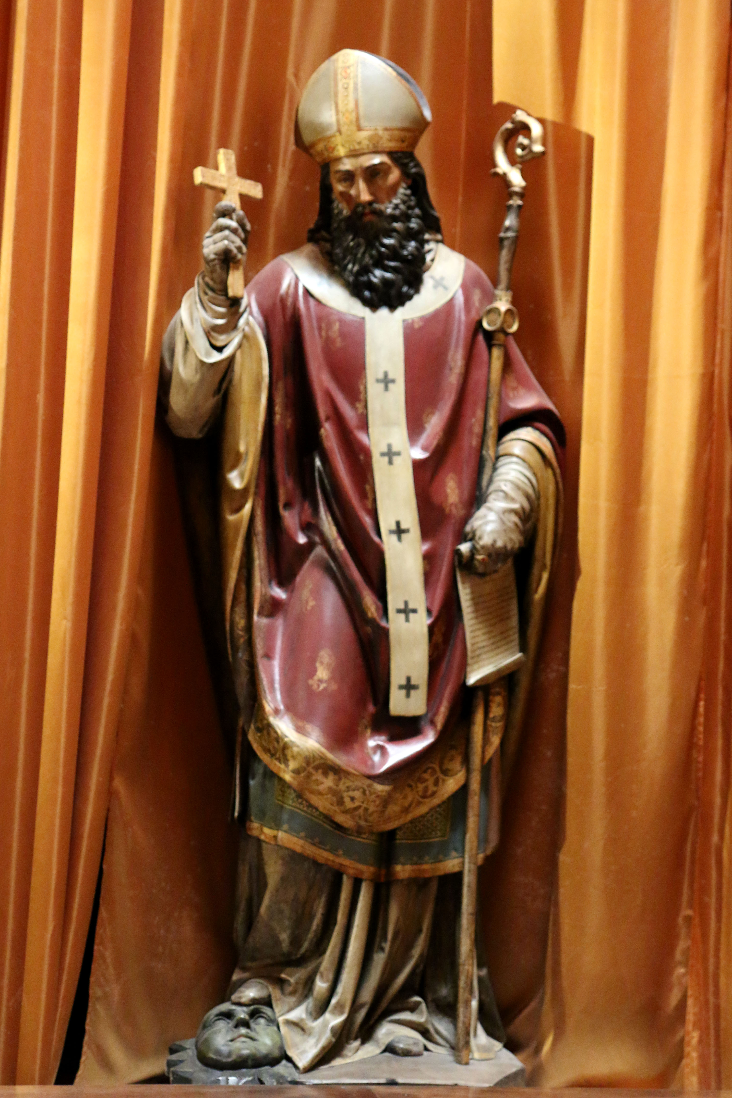 Statue en bois polychrome de Saint Serenus, dixième évêque de Marseille, dans l'église de La Trinité-La-Palud à Marseille.